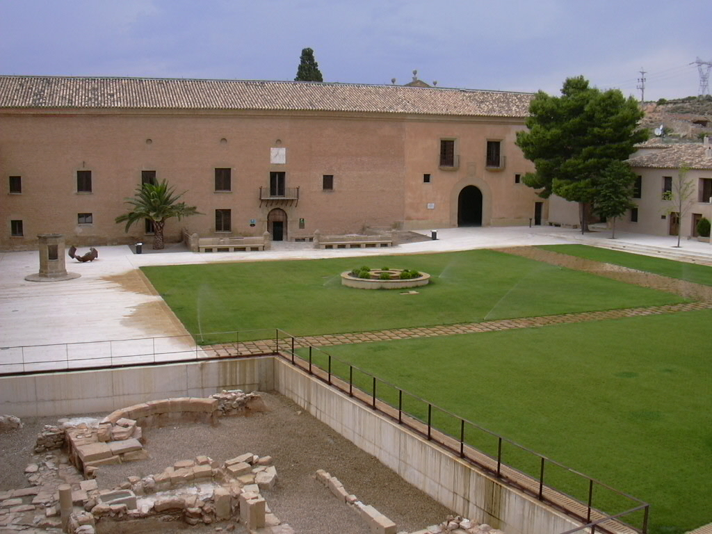 Rueda - Plaza de San Pedro - Vista desde claustro